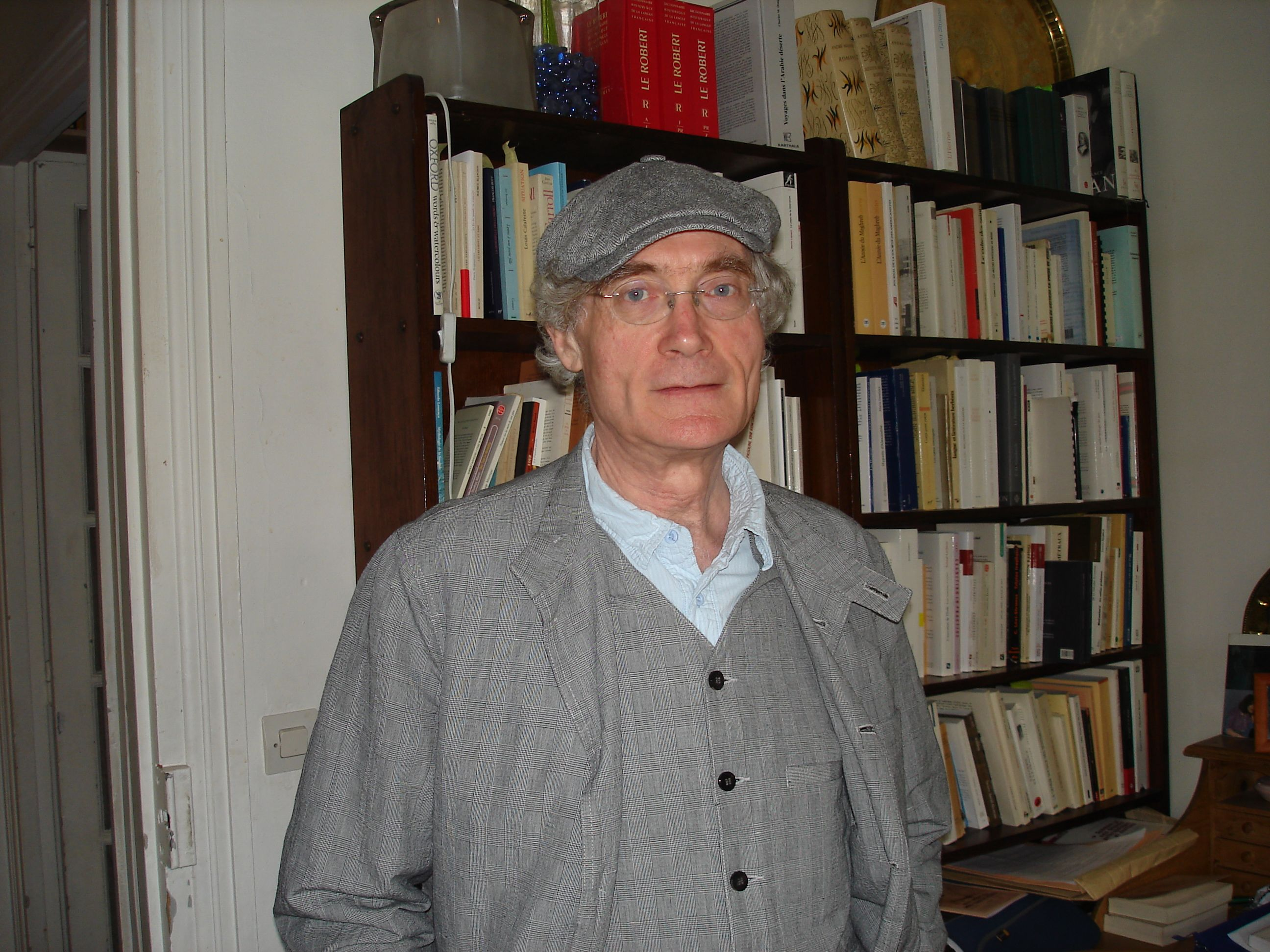 Dominique Casajus juin 2011